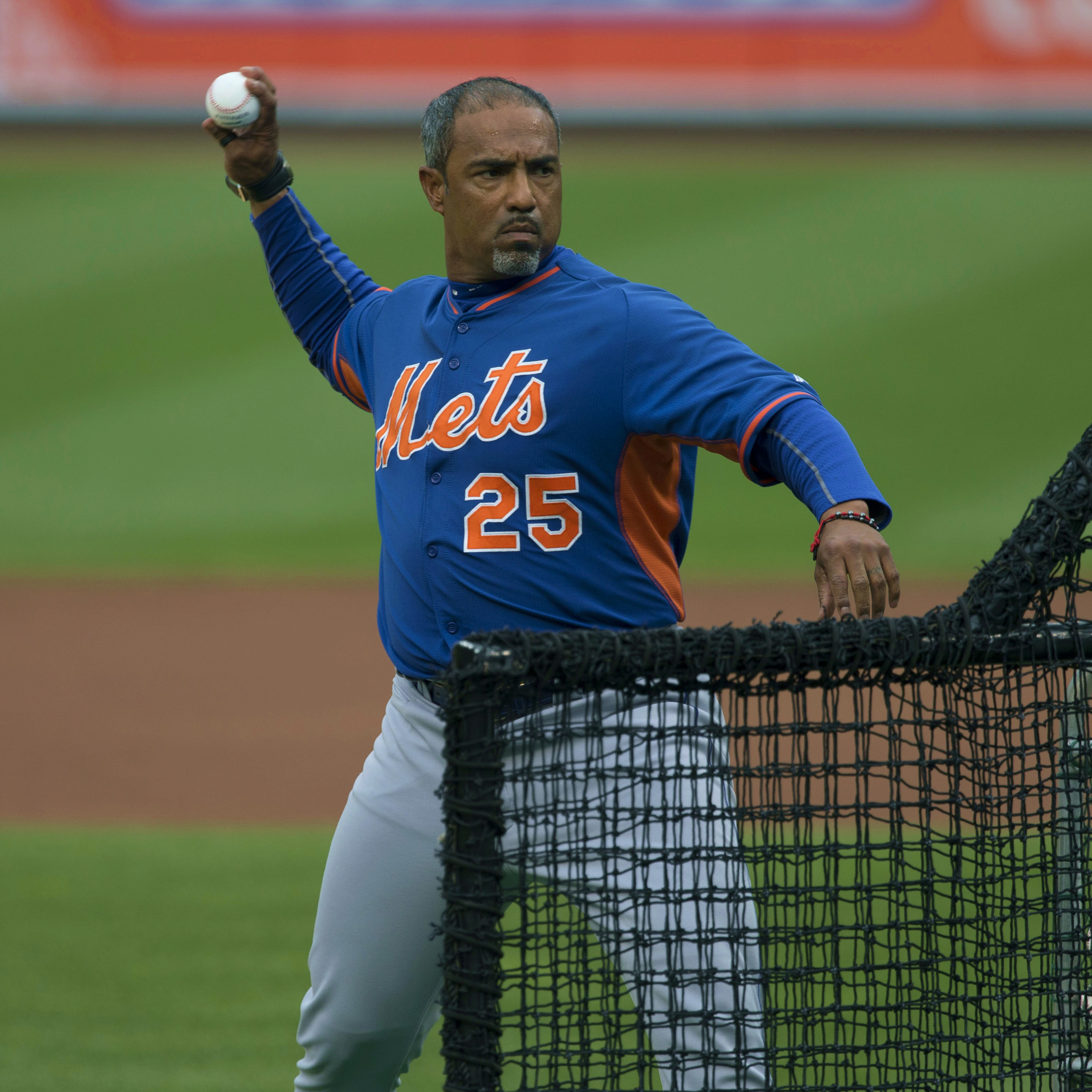 Ricky Bones